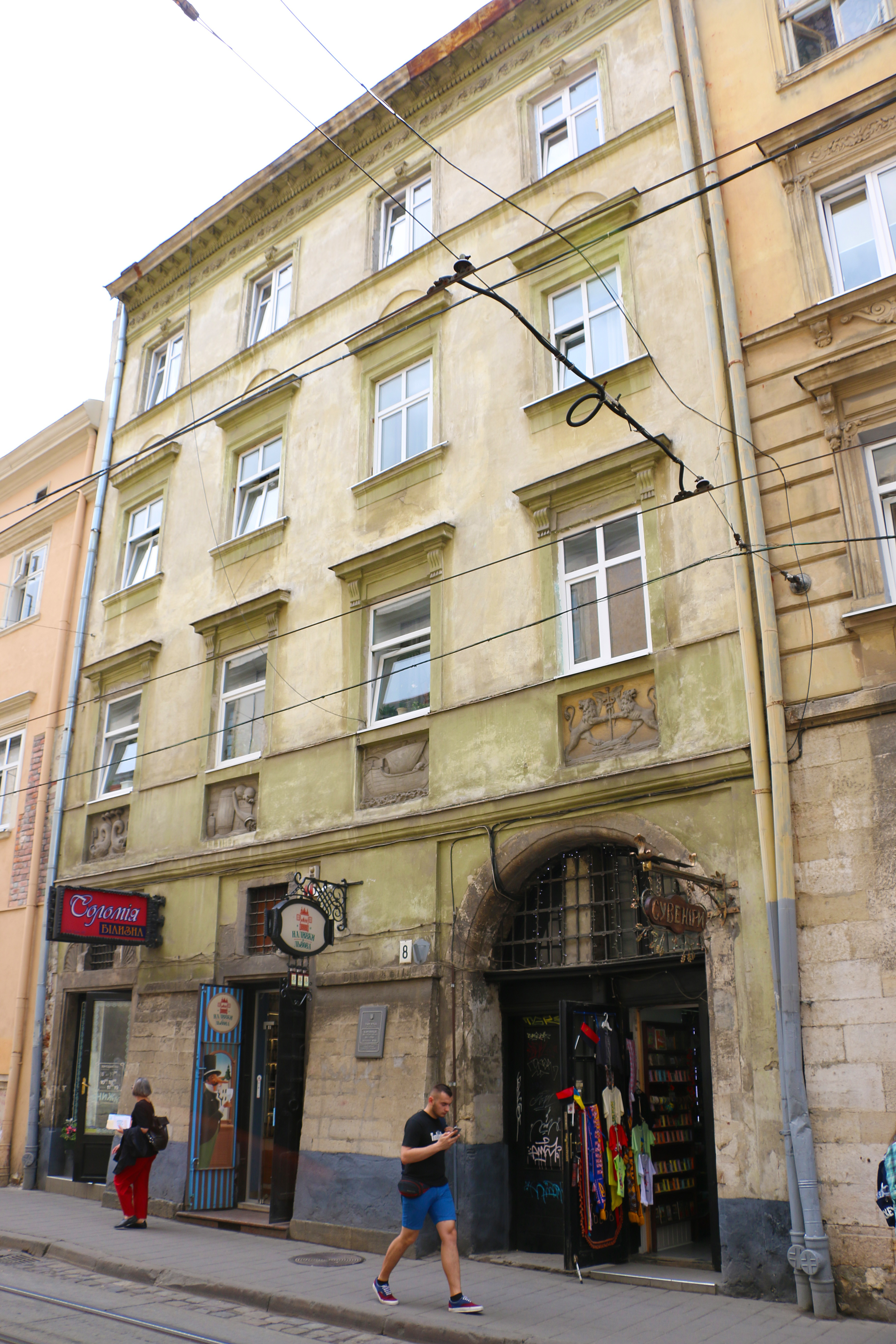 житловий будинок, Львів, Руська, 8